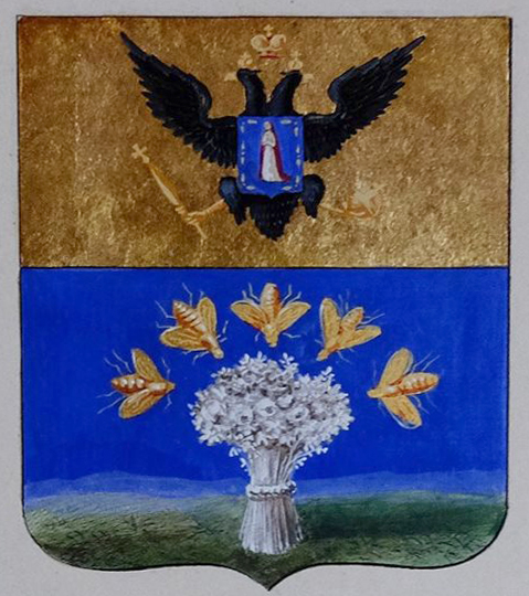 Беларуская (тарашкевіца): Ігумен (Ihumien). Расейскі герб места